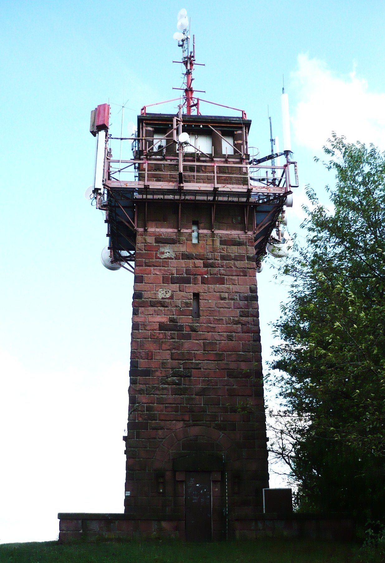 Nowa Ruda, wieża na Górze św. Anny